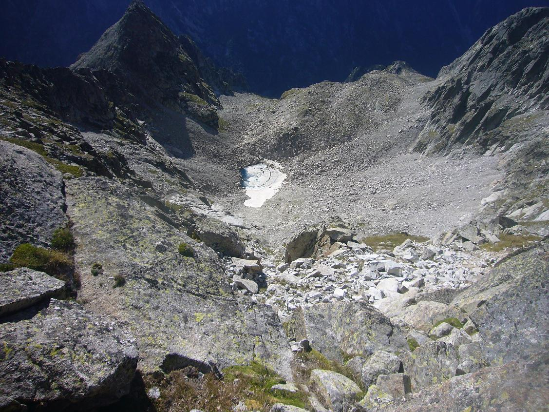 Estanyet de Comaloforno vist des del Pic de Comaloforno, la Vall de Boí, Alta Ribagorça, Catalunya.